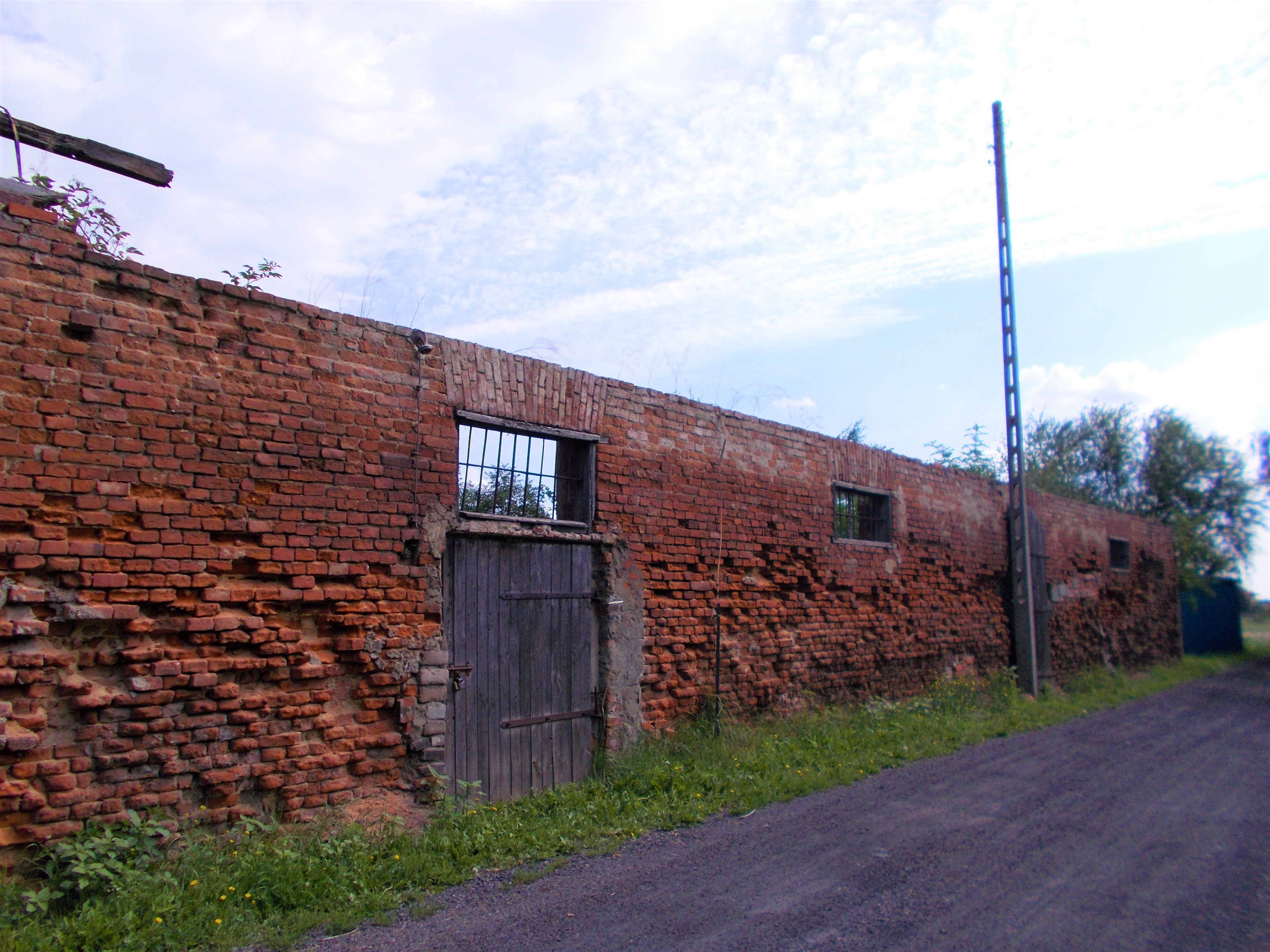 Podkoce, obora